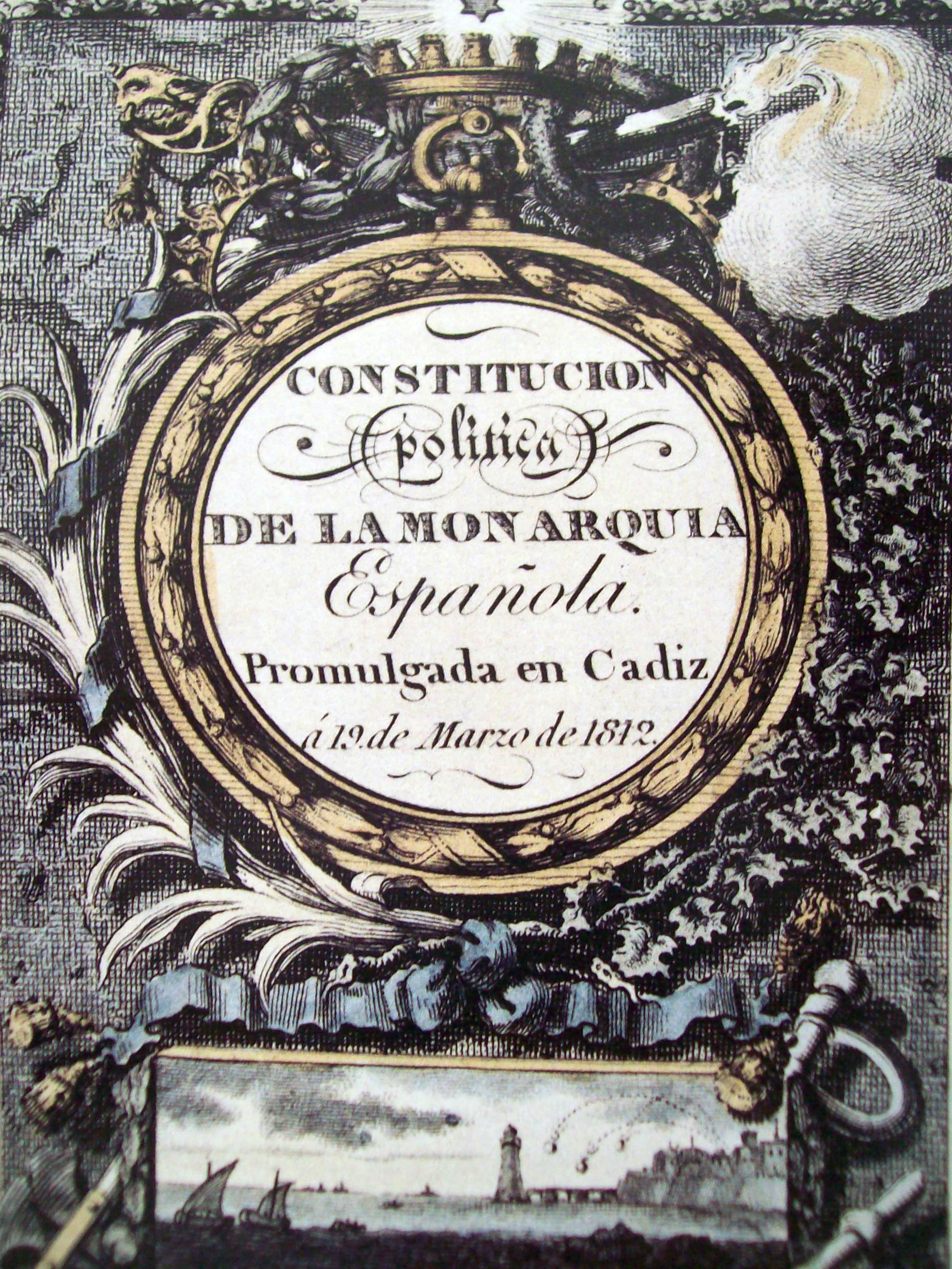 Constitución de Cádiz. Portada de la Constitución política de la monarquía española: Promulgada en Cádiz a 19 de marzo de 1812. Madrid, Imprenta que fue de García, 1820 (Biblioteca Nacional de España, sign 1/40880